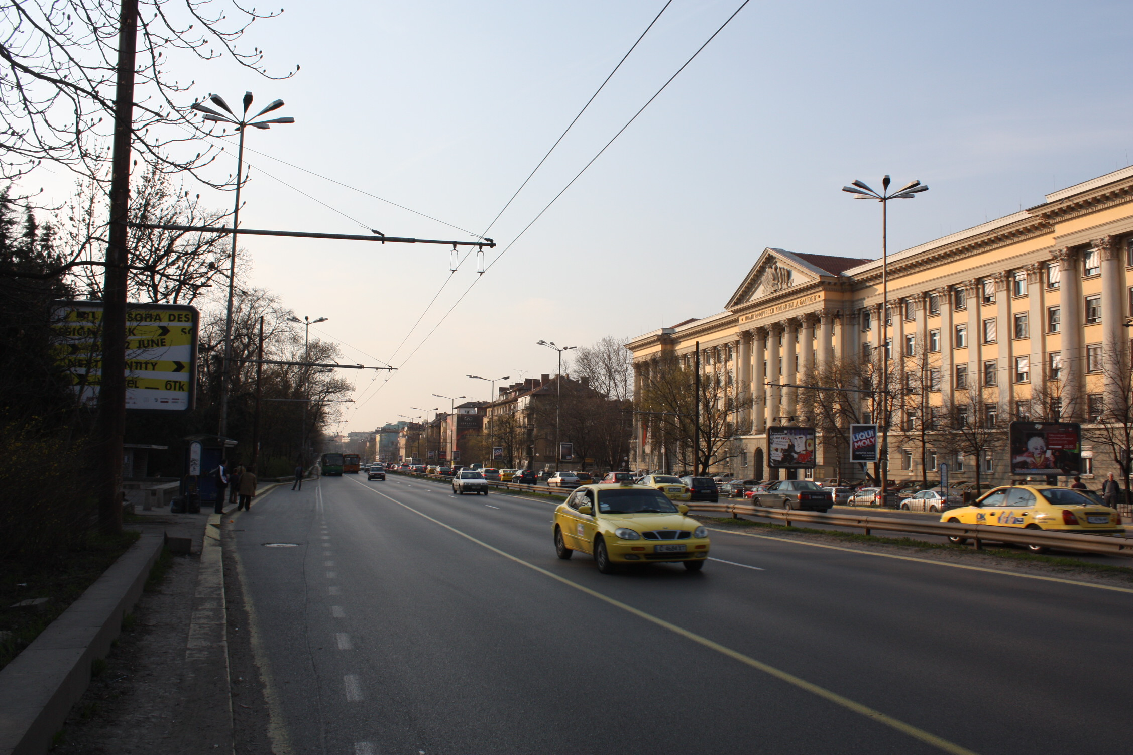 Tzarigradsko shose, Tzarigradsko shose and Poligrafitscheski kombinat, Цариградско шосе и Полиграфически Комбинат, Zarigradsko Chaussée, die Straße von Sofia (Beginn an der Adlerbrücke) nach Plovdiv, Sofia, Bulgaria